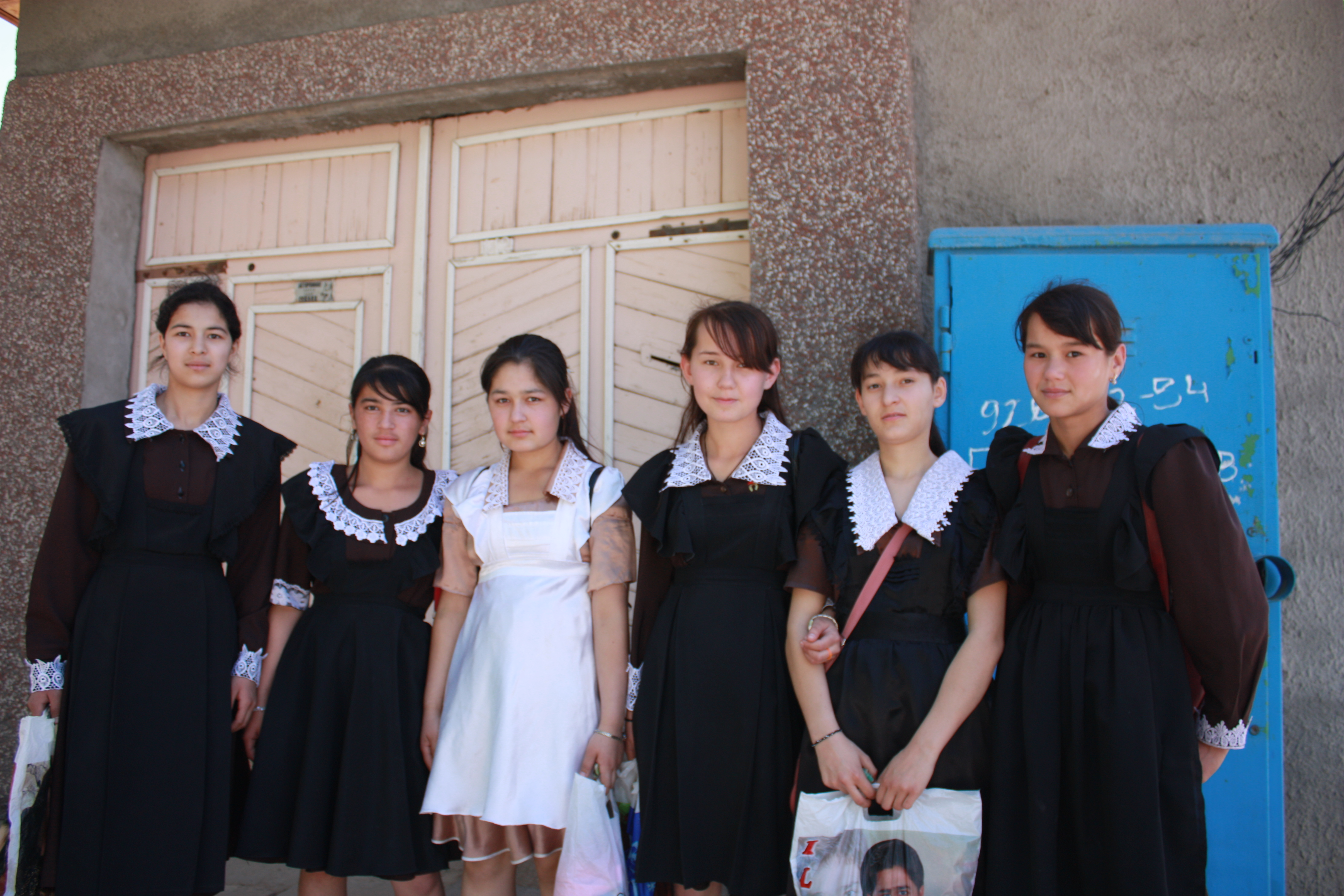 Samarkand, school girls